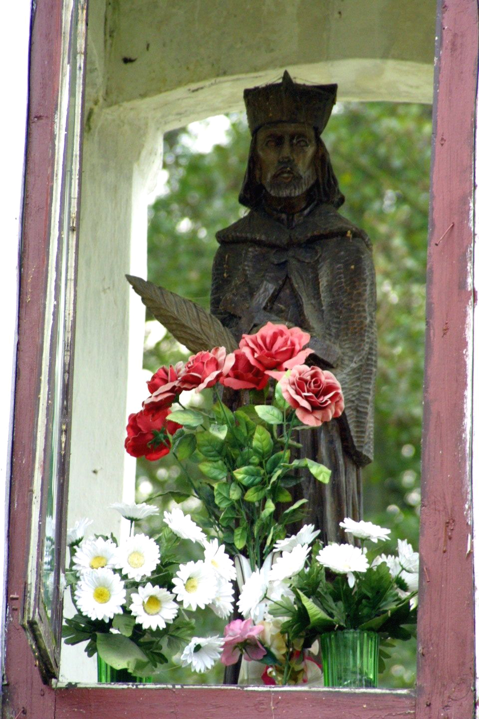 Wólka Okrąglik. Ludowa rzeźba św. Jana Nepomucena w kapliczce z XIX w.